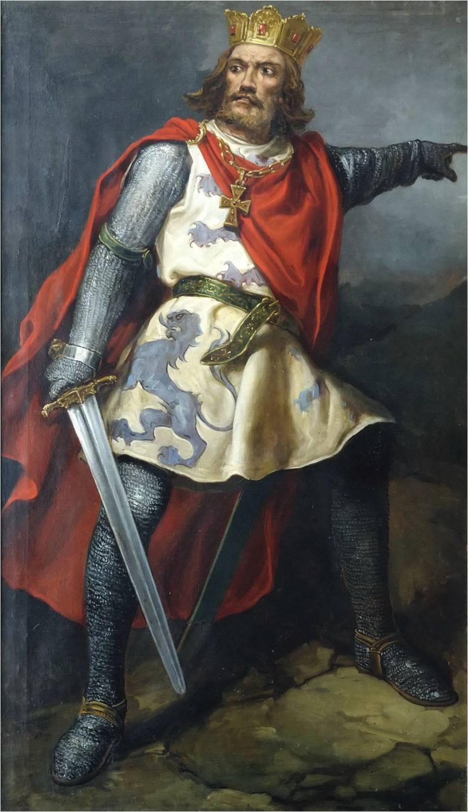 Retrato imaginario del rey Bermudo III de León (1017-1037). Fue hijo del rey Alfonso V de León y de la reina Elvira Menéndez. Murió en la batalla de Tamarón, librada en 1037, y a su muerte el trono leonés fue ocupado por su cuñado, Fernando I de León.